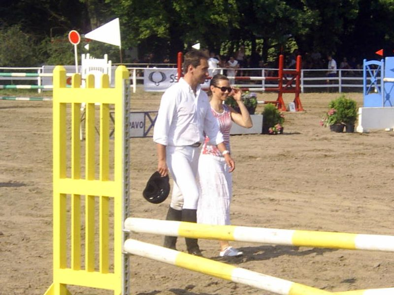 Piotr Kraśko; Kinga Rusin (Gałkowo Cup; Polska)